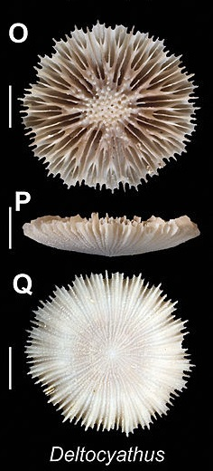 Recorte de archivo Commons ZooKeys-227-001-g019 jpeg